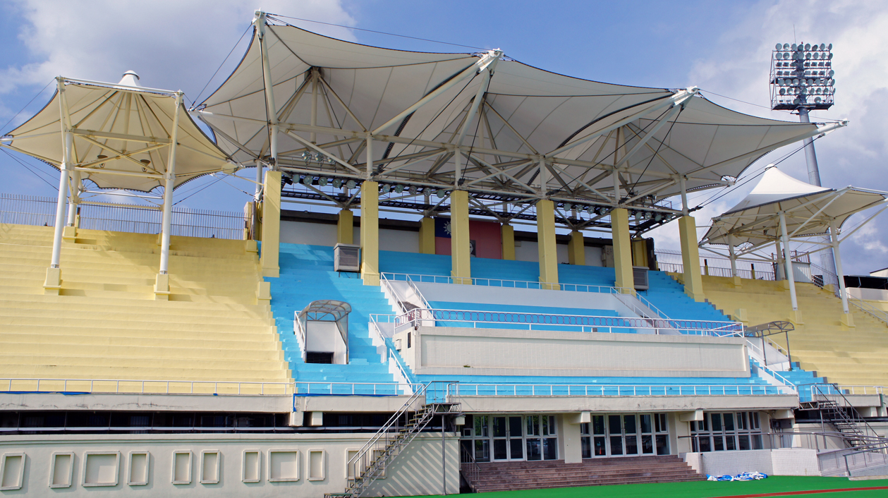 中文（台灣）: 國立臺灣體育運動大學臺中體育場